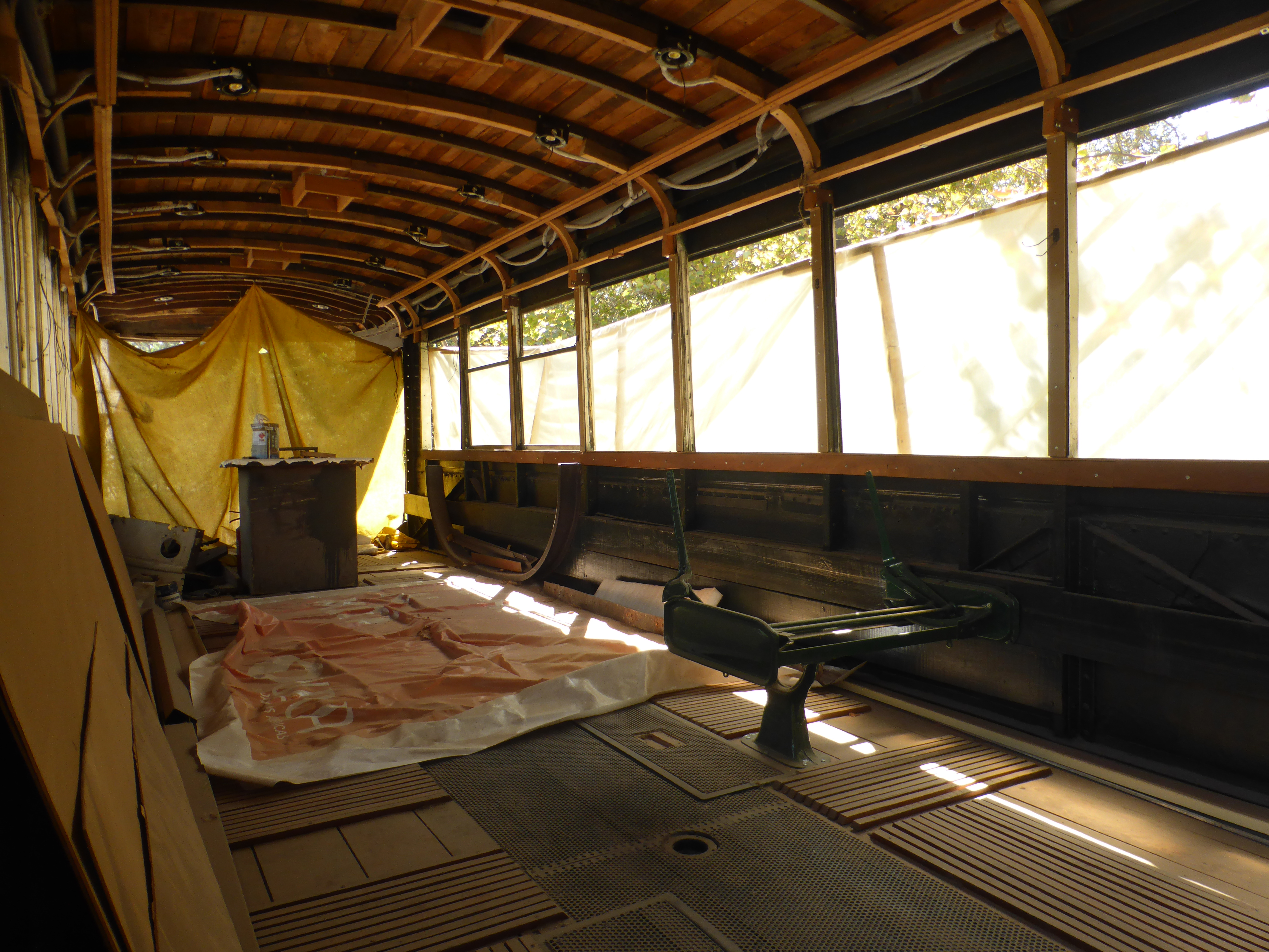 Antiguo tranvía en restauración. Es uno de los dos únicos tranvías históricos conservados en Chile. Es original (no recreación), aunque está incompleto.